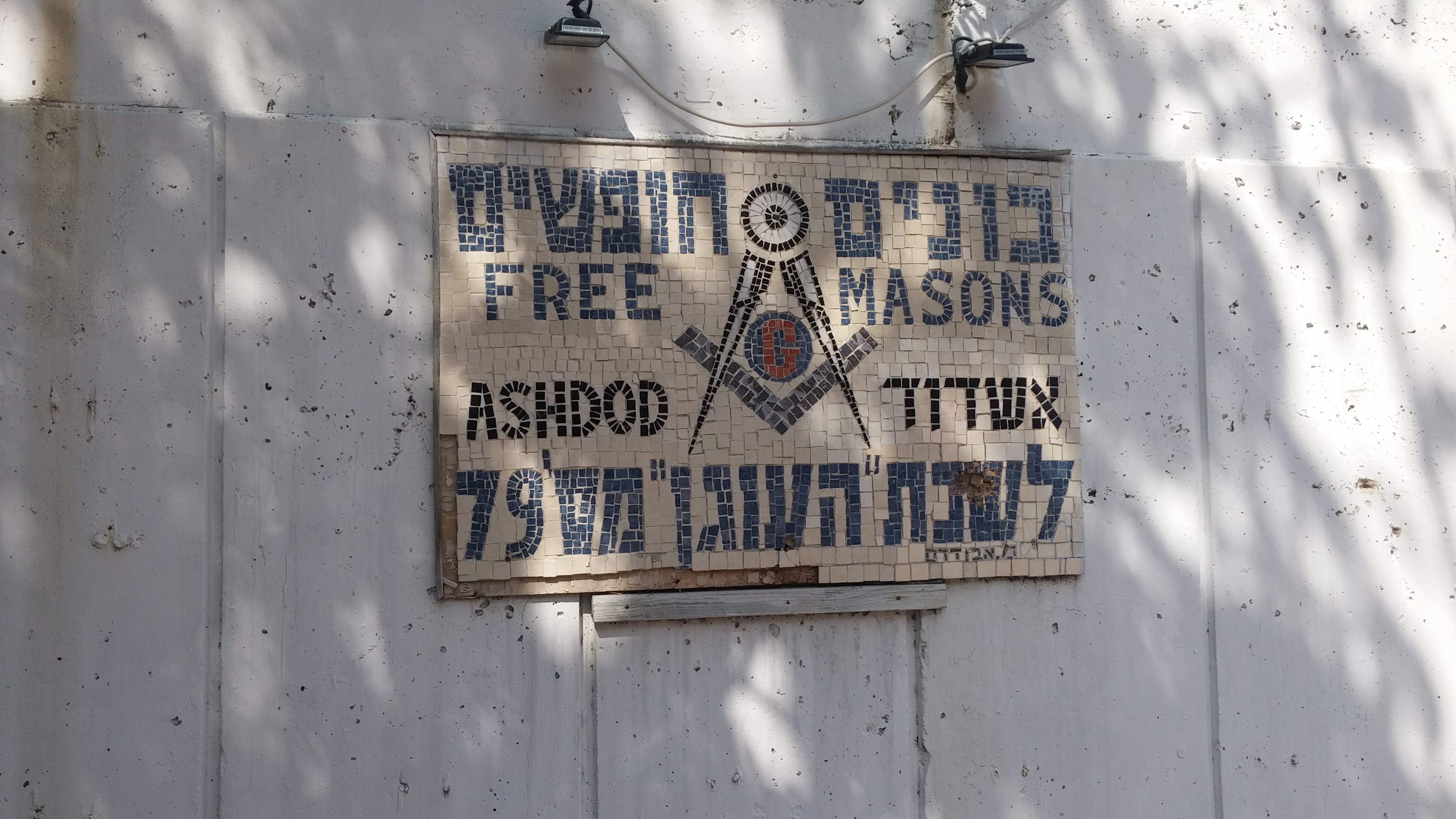 הבונים החופשיים לשכת העוגן באשדוד